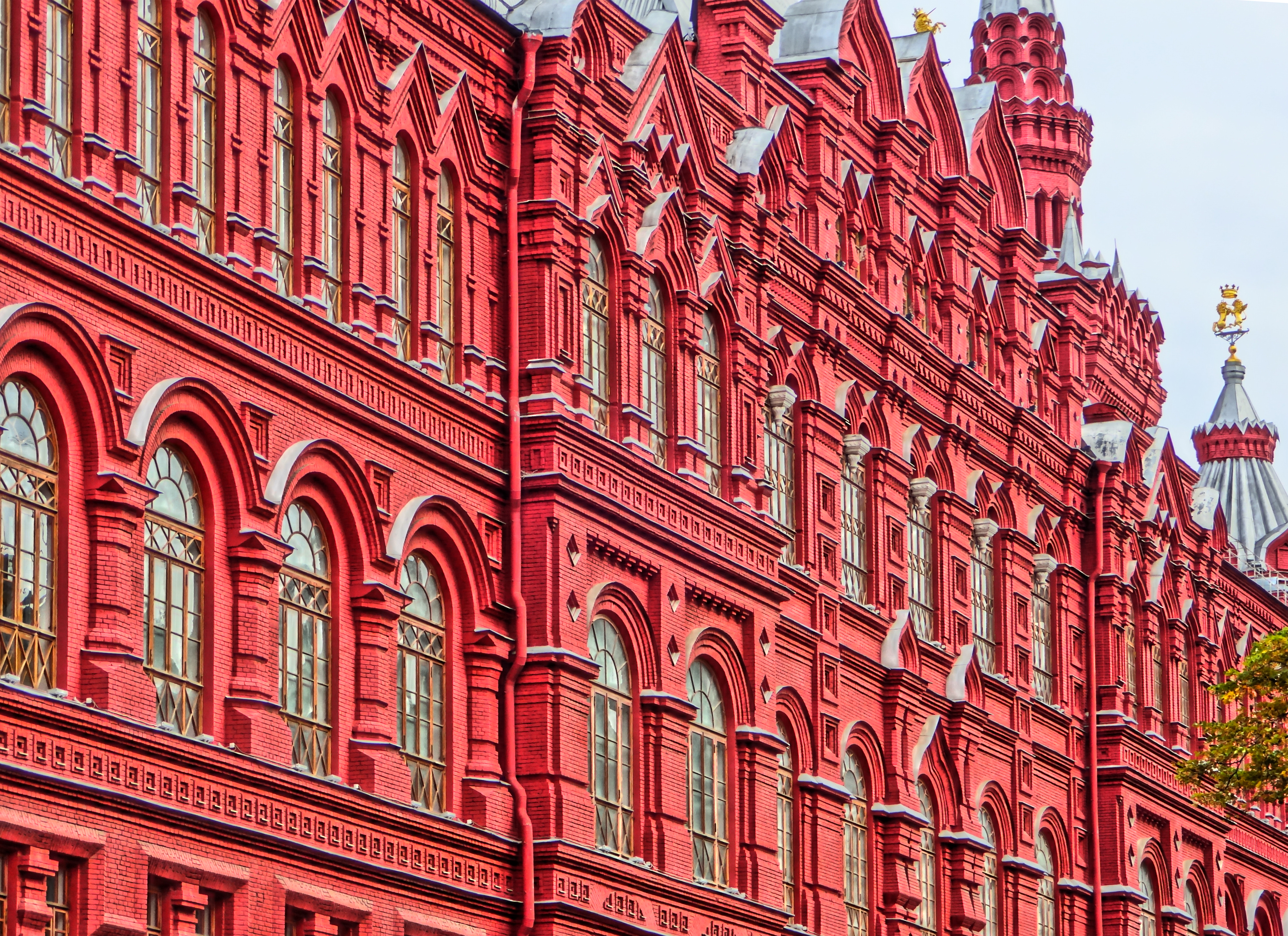 Российский Исторический музей (Москва и Московская область, Москва, Красная площадь, 1/2)